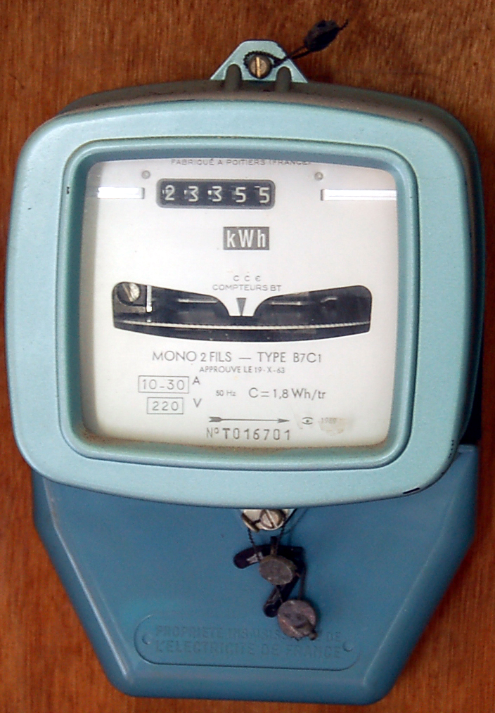 Compteur électrique en France Electrical meter from France